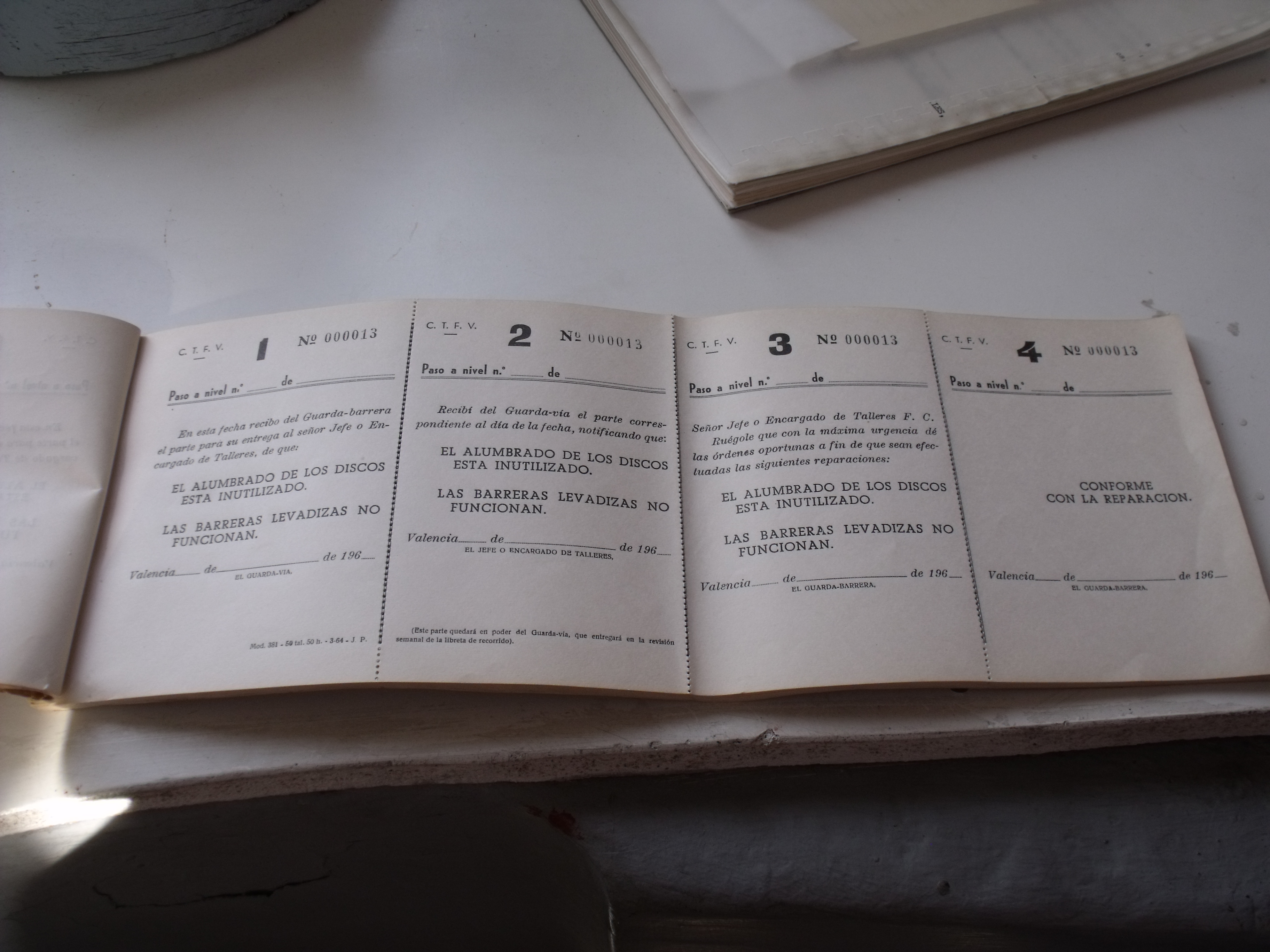 Parte de incidencias de la Compañía de Ferrocarriles y Tranvías de Valencia.